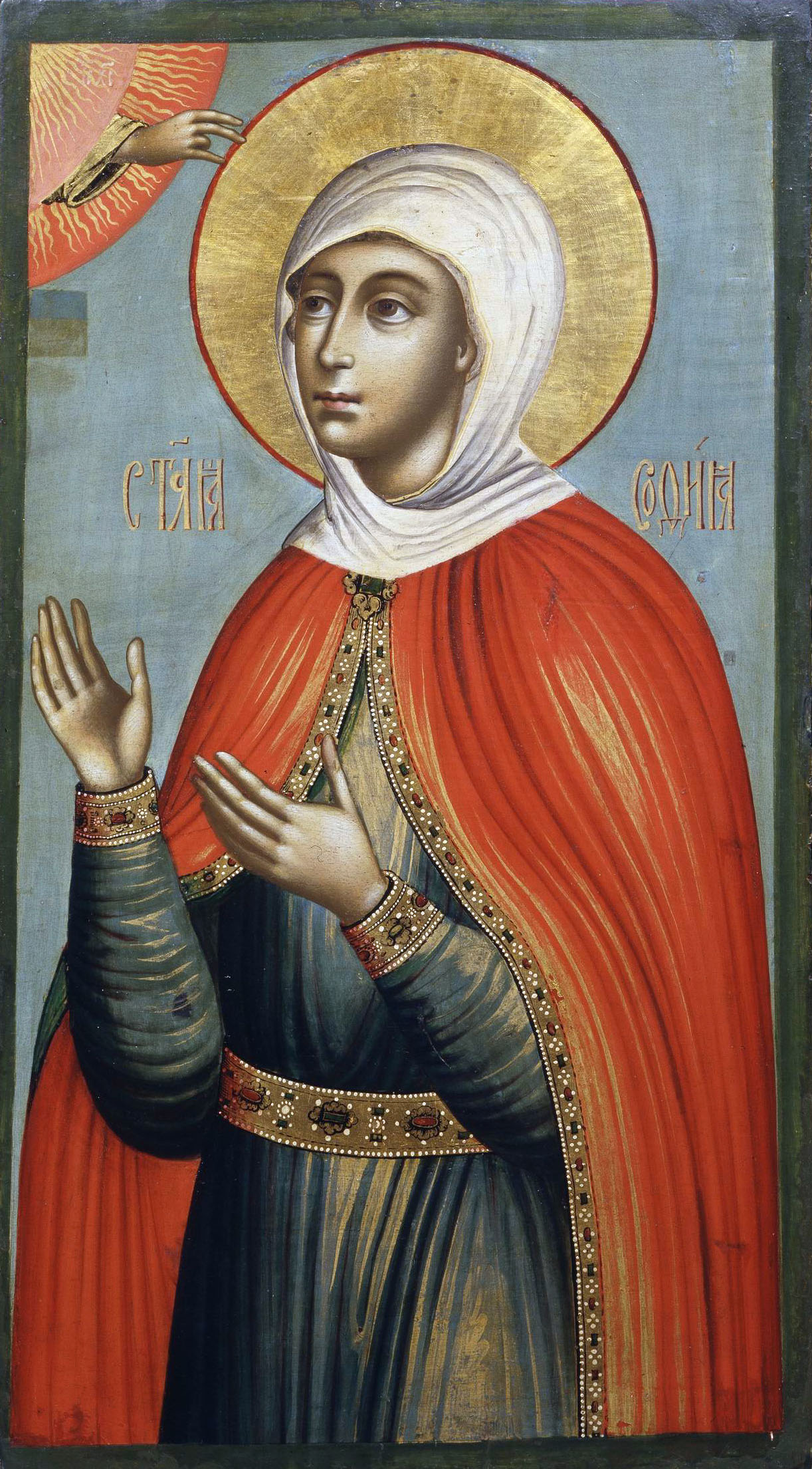 София?